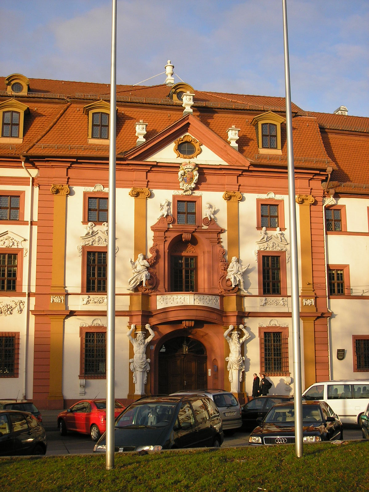 Das Portal der Thüringer Staatskanzlei in Erfurt